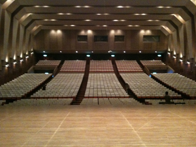 府中文化センター大ホールの舞台から客席を臨む